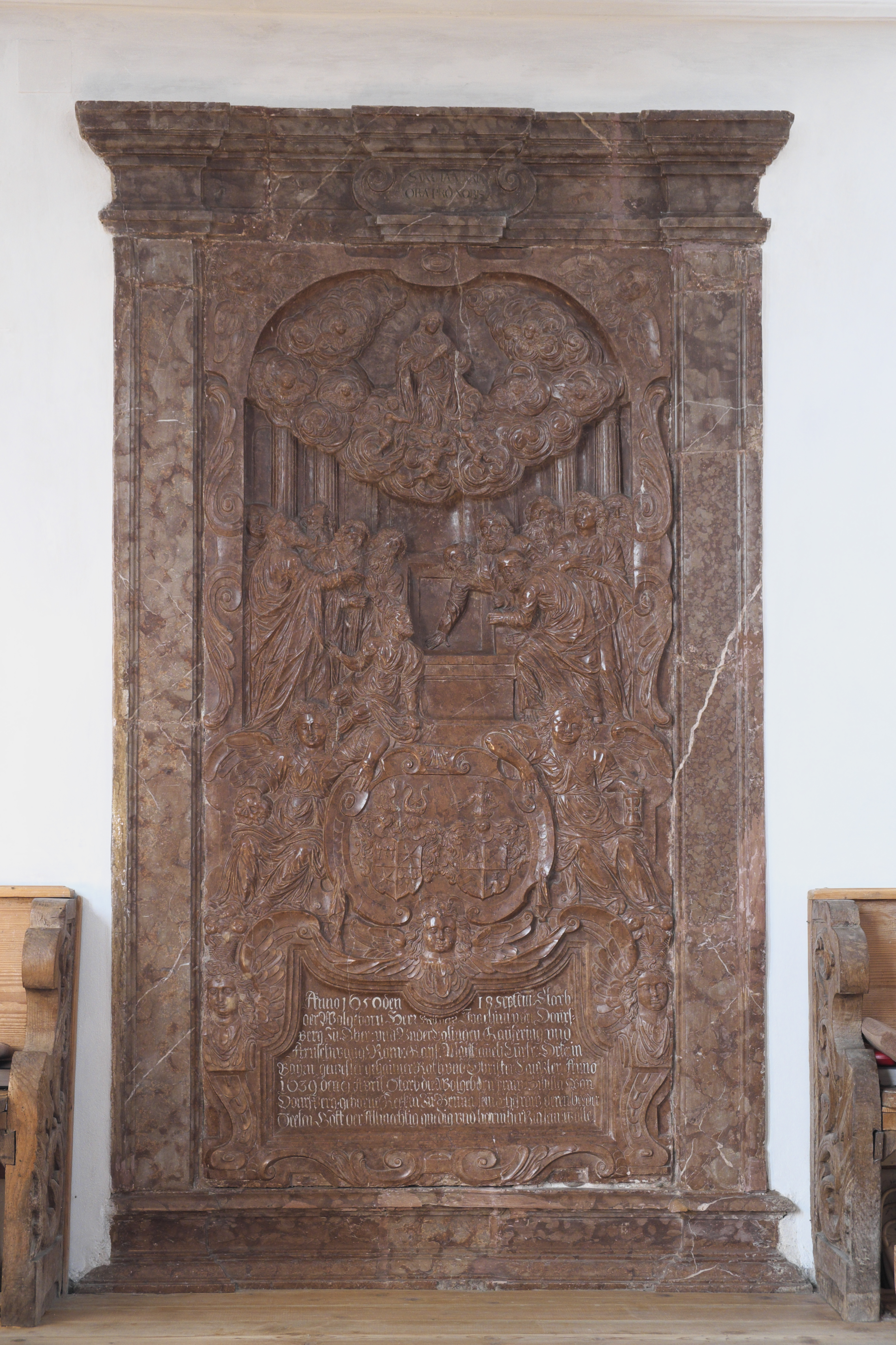 Katholische Pfarrkirche Sankt Peter und Paul in Oberigling (Igling) im Landkreis Landsberg am Lech (Bayern/Deutschland), Epitaph für Joachim von Donnersberg († 1650)